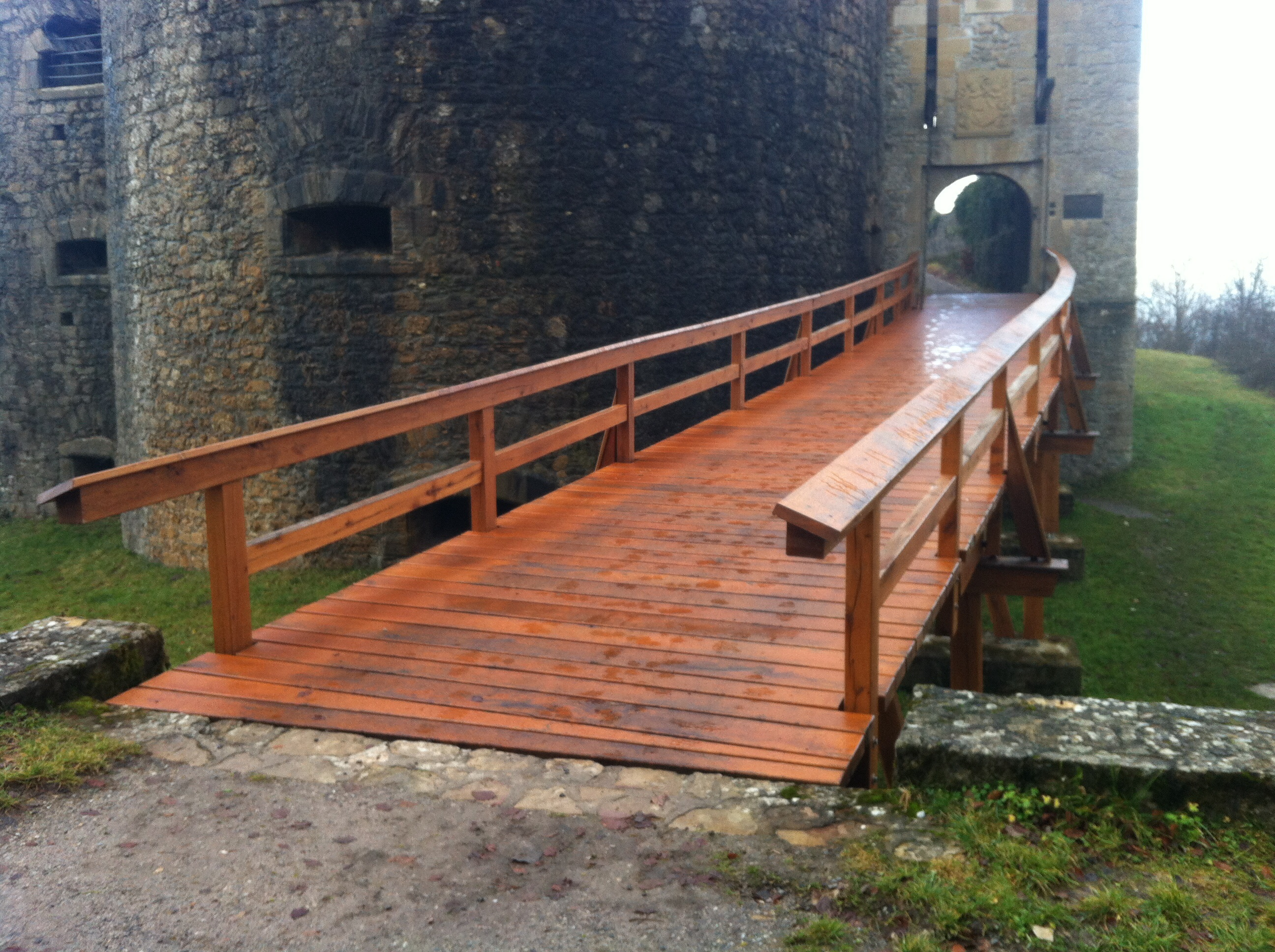 Küssaburg im Landkreis Waldshut, Baden-Württemberg. Eingangsbereich. Neue Zugbrücke, 2016.